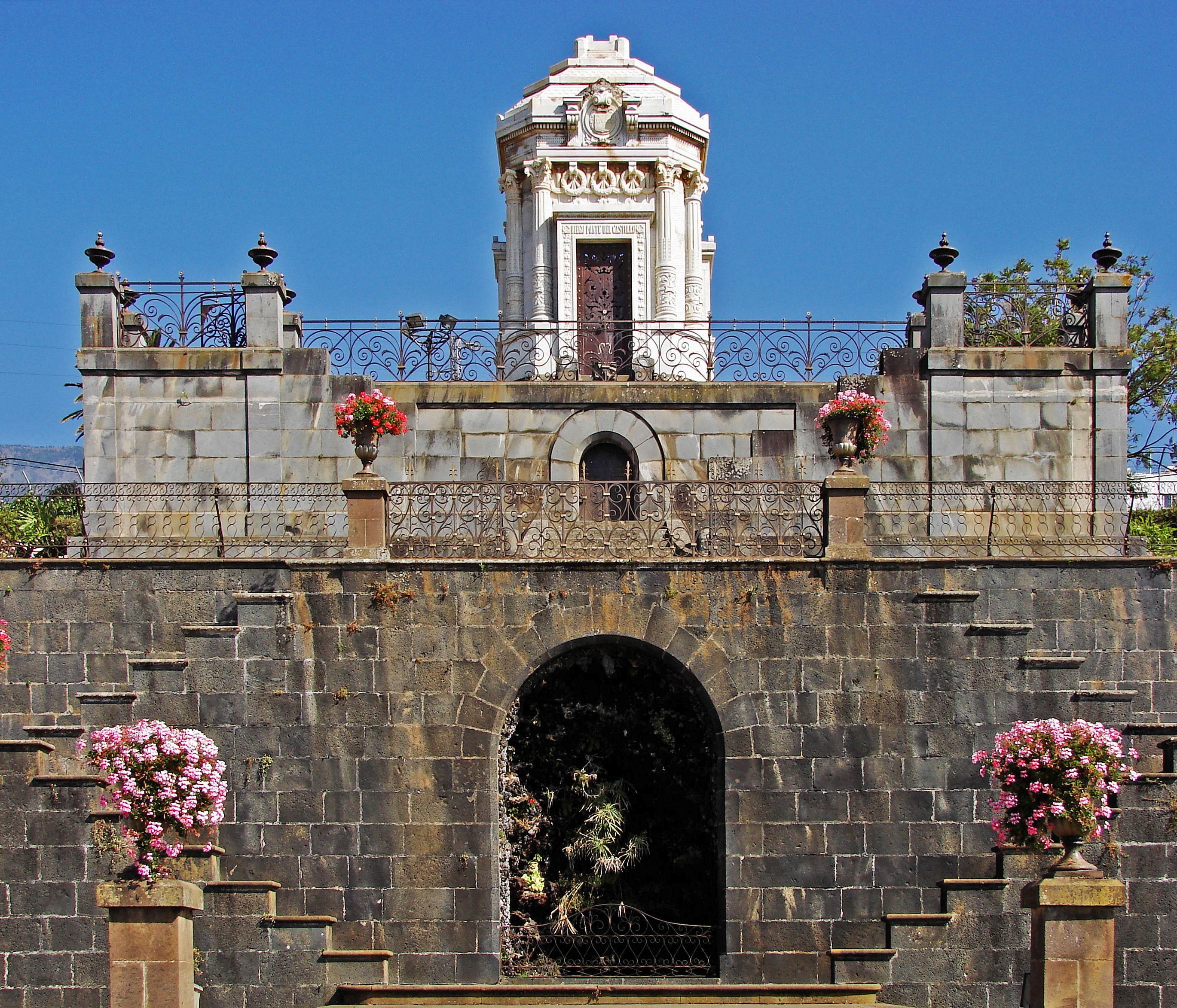 Mausoleum mit Sockel, Jardines del Marquesado de la Quinta Roja, La Orotava